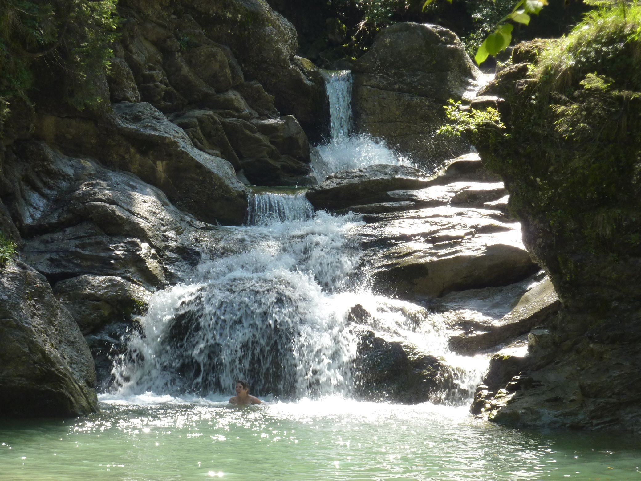 Ostertaltobel